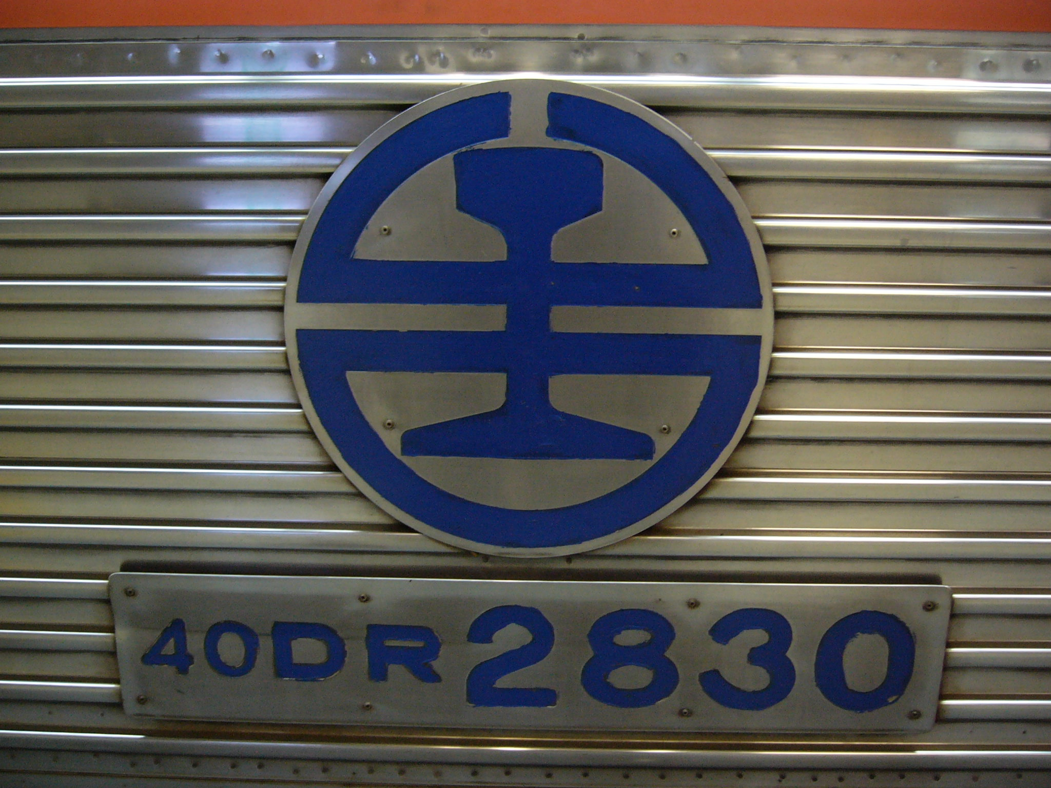 中文（台灣）: 臺灣鐵路管理局柴聯車DR2830外側中央，局徽與車號銘板。